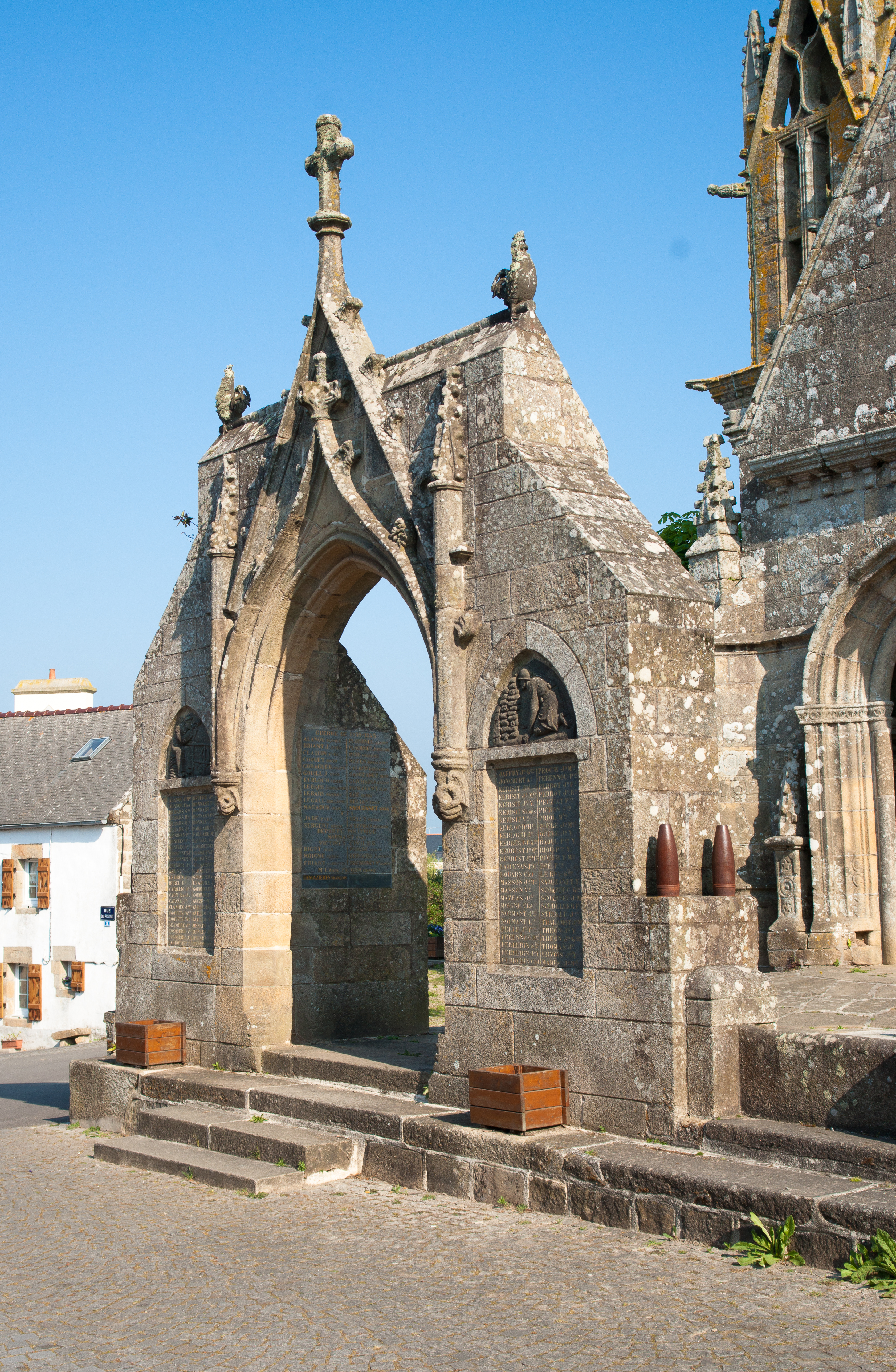 Esquibien - église Saint-Onneau. Arc de triomphe transformé en monument aux morts.